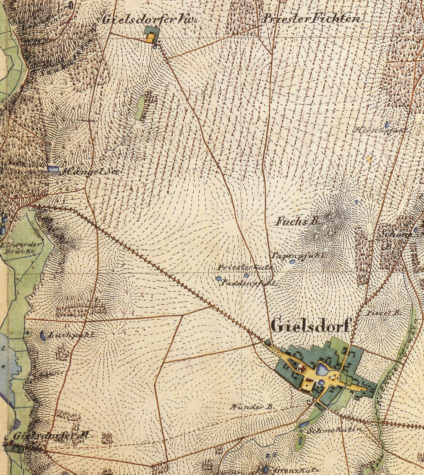 Gielsdorf, Ortsteil der Stadt Altlandsberg, Lkr. Märkisch-Oderland, Brandenburg, Ausschnitt aus dem Urmesstischblatt 3299 Prötzel von 1843